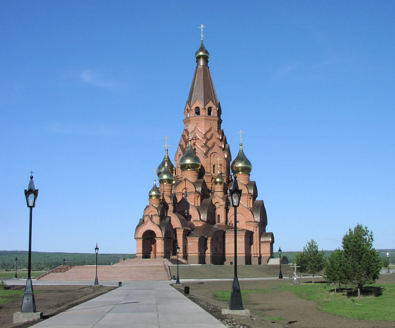 Крестовоздвиженский храм в Лесосибирске